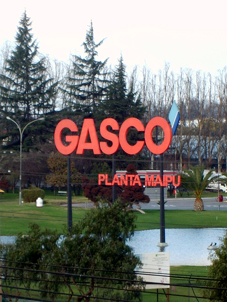 La planta de la empresa Gasco en Maipú, Santiago de Chile.